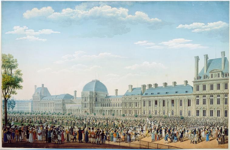 Le palais des Tuileries